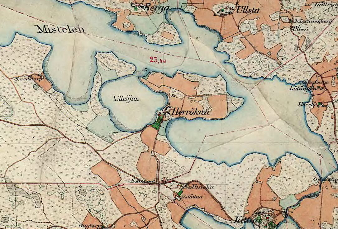 Del av Häradsekonomiska kartan visande Herrökna säteri med omgivning